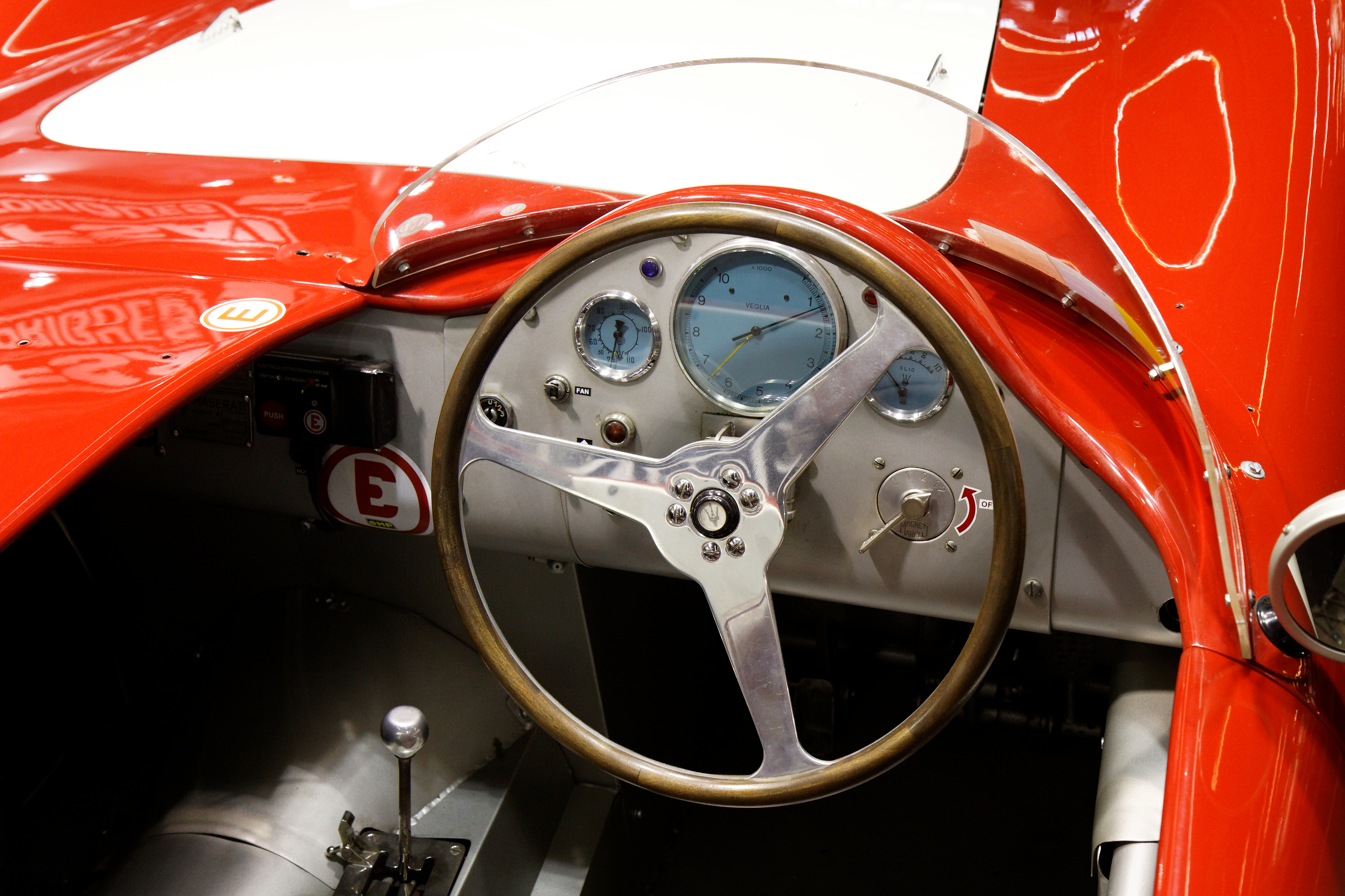 Photographie prise lors du salon rétromobile 2011 à Paris, porte de Versailles.